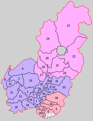 秋田県仙北郡の町村。